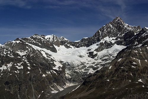 Oberes Gabelhorn (???)